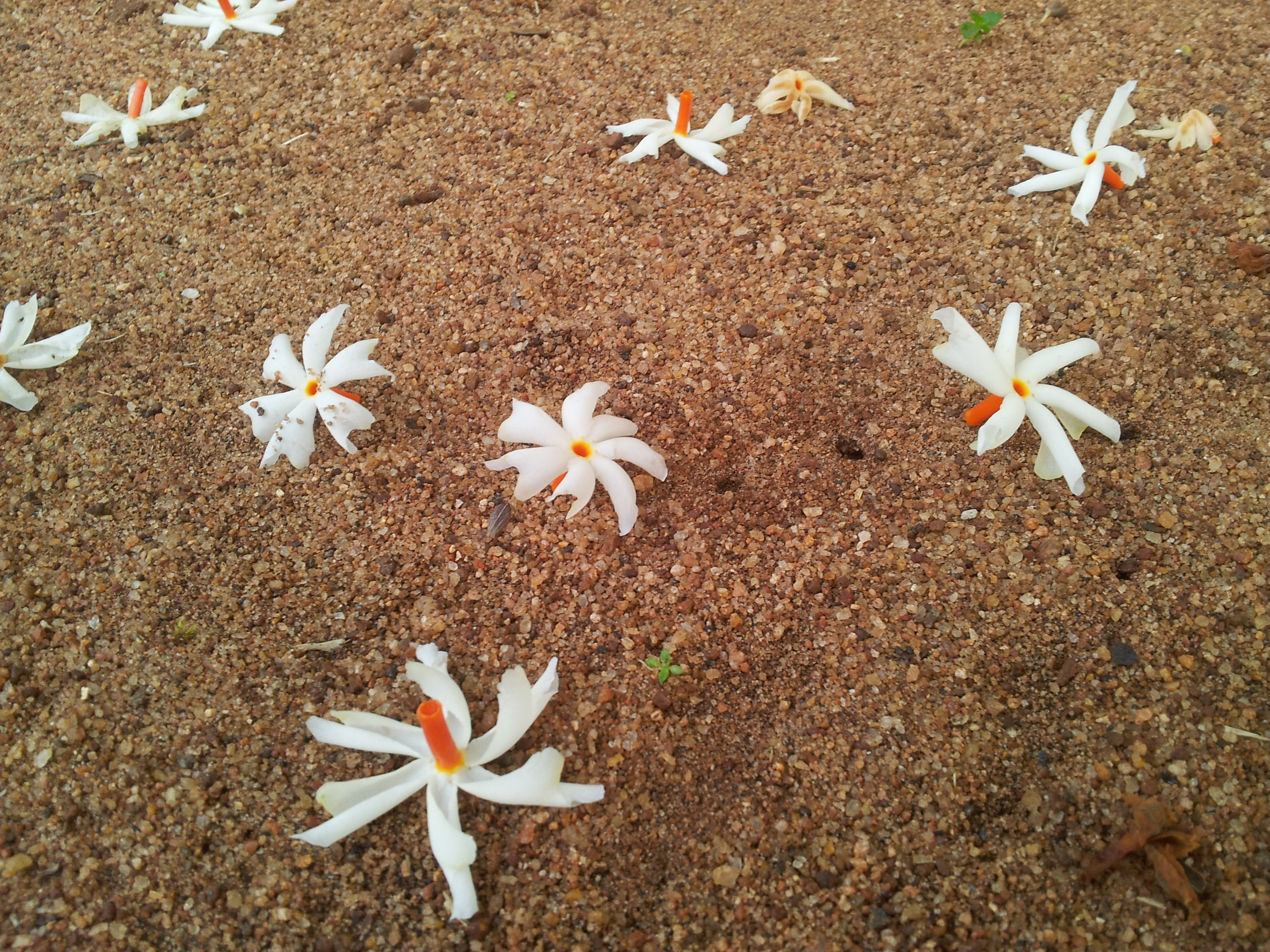 തൃശൂർ വടക്കുംനാഥ ക്ഷേത്രത്തിലെ പവിഴ മല്ലി